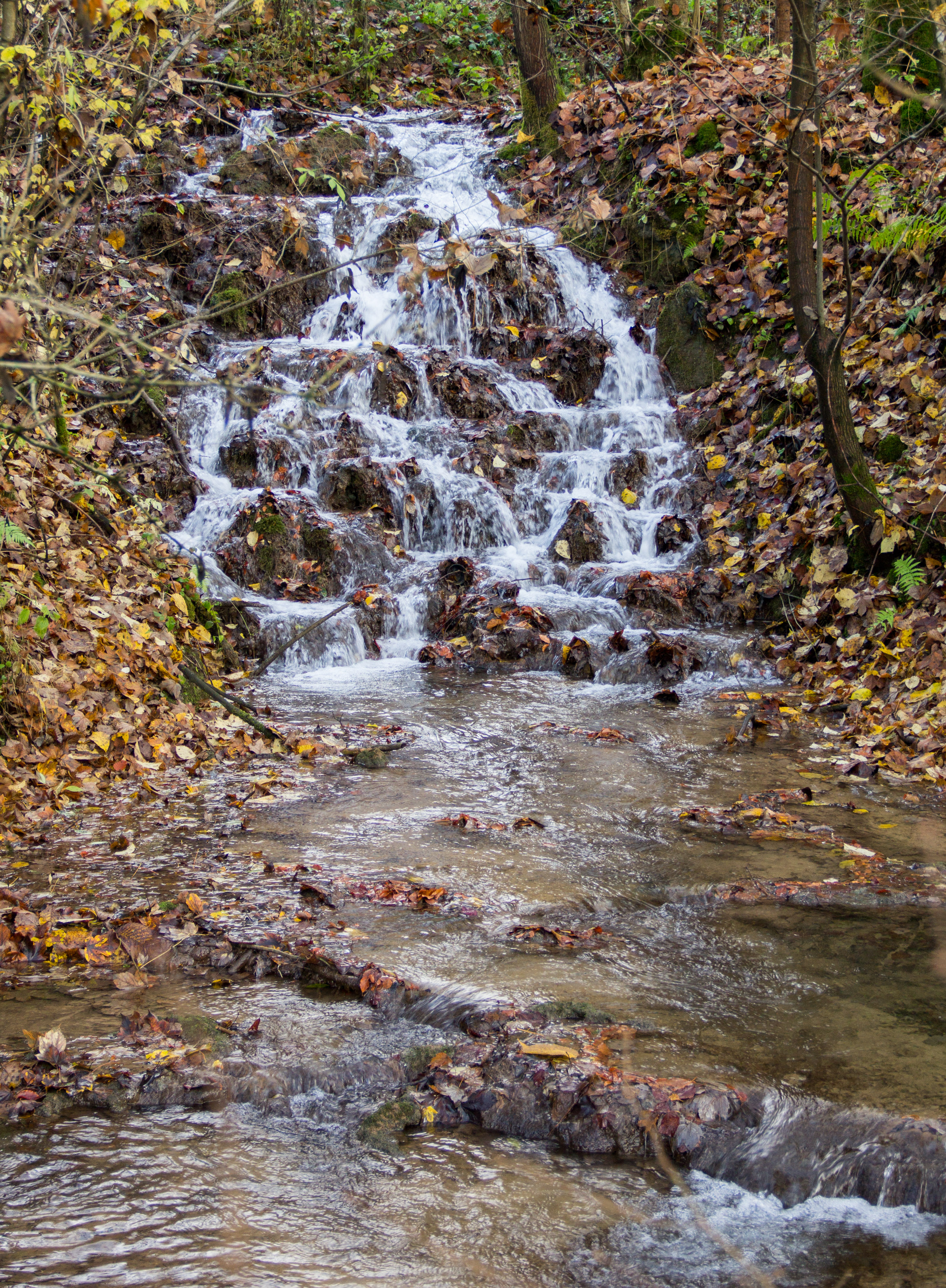 Wasserfall, Äpfelbach, Egloffstein, Geotop